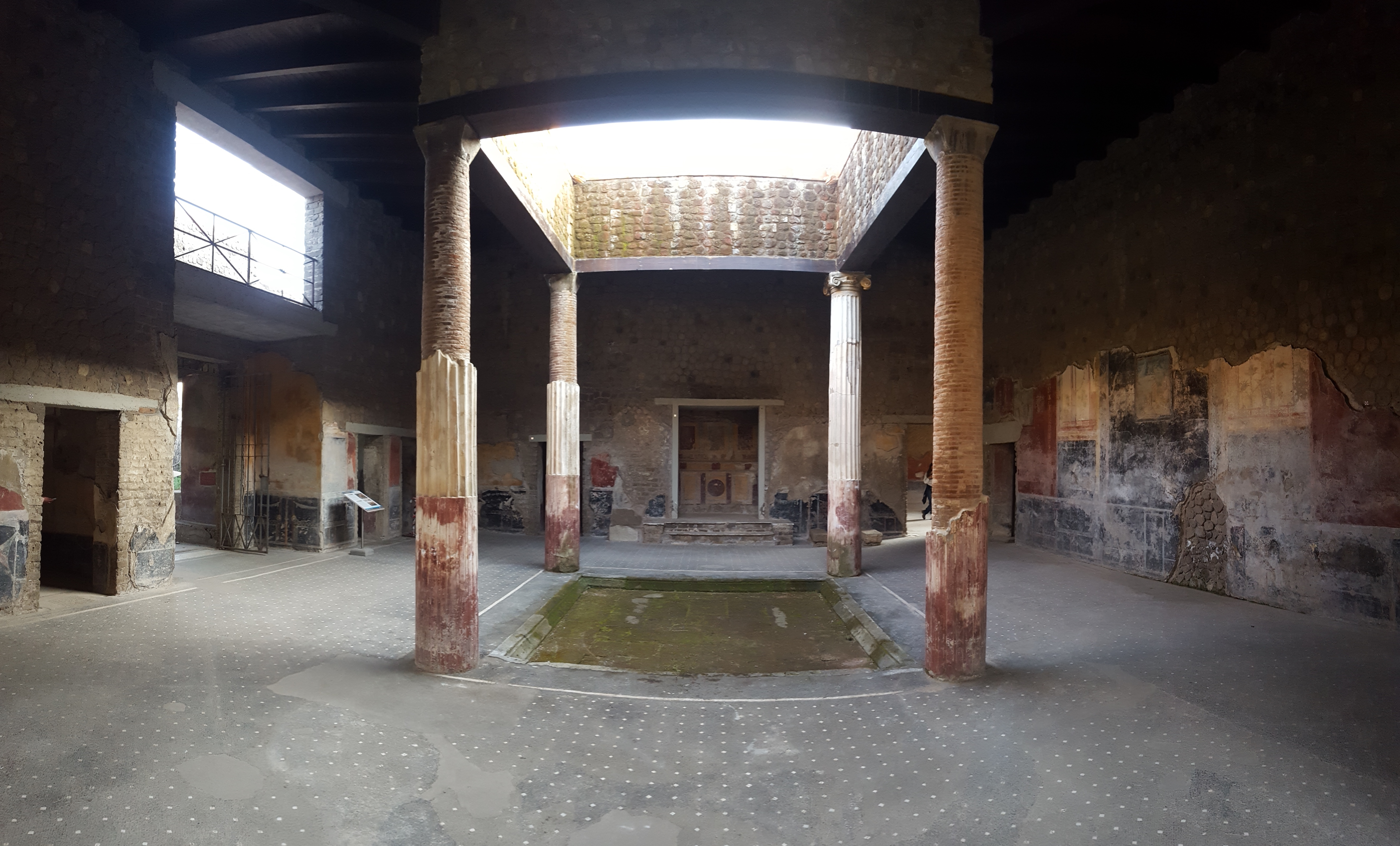 Villa San Marco This is a photo of a monument which is part of cultural heritage of Italy.